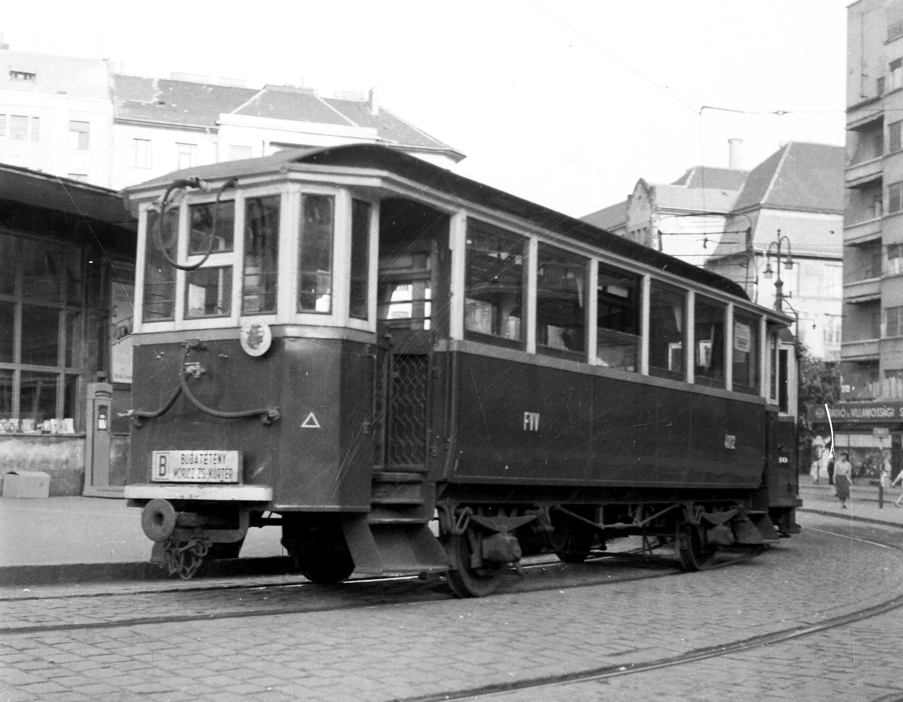 Móricz Zsigmond körtér. Location: Hungary, Budapest Tags: commuter train Title: Móricz Zsigmond körtér.